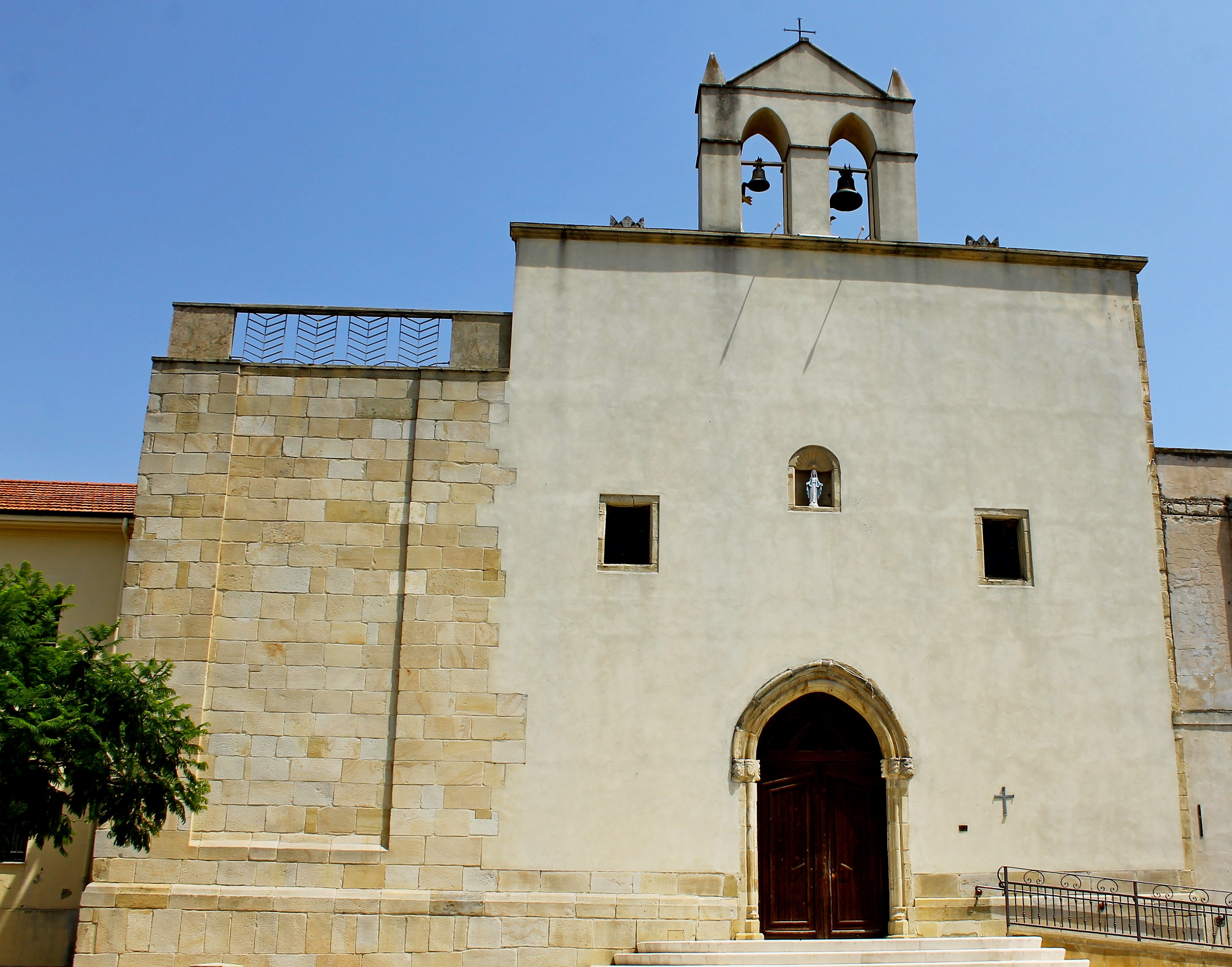 Chiesa San Pietro, San Basilio SU